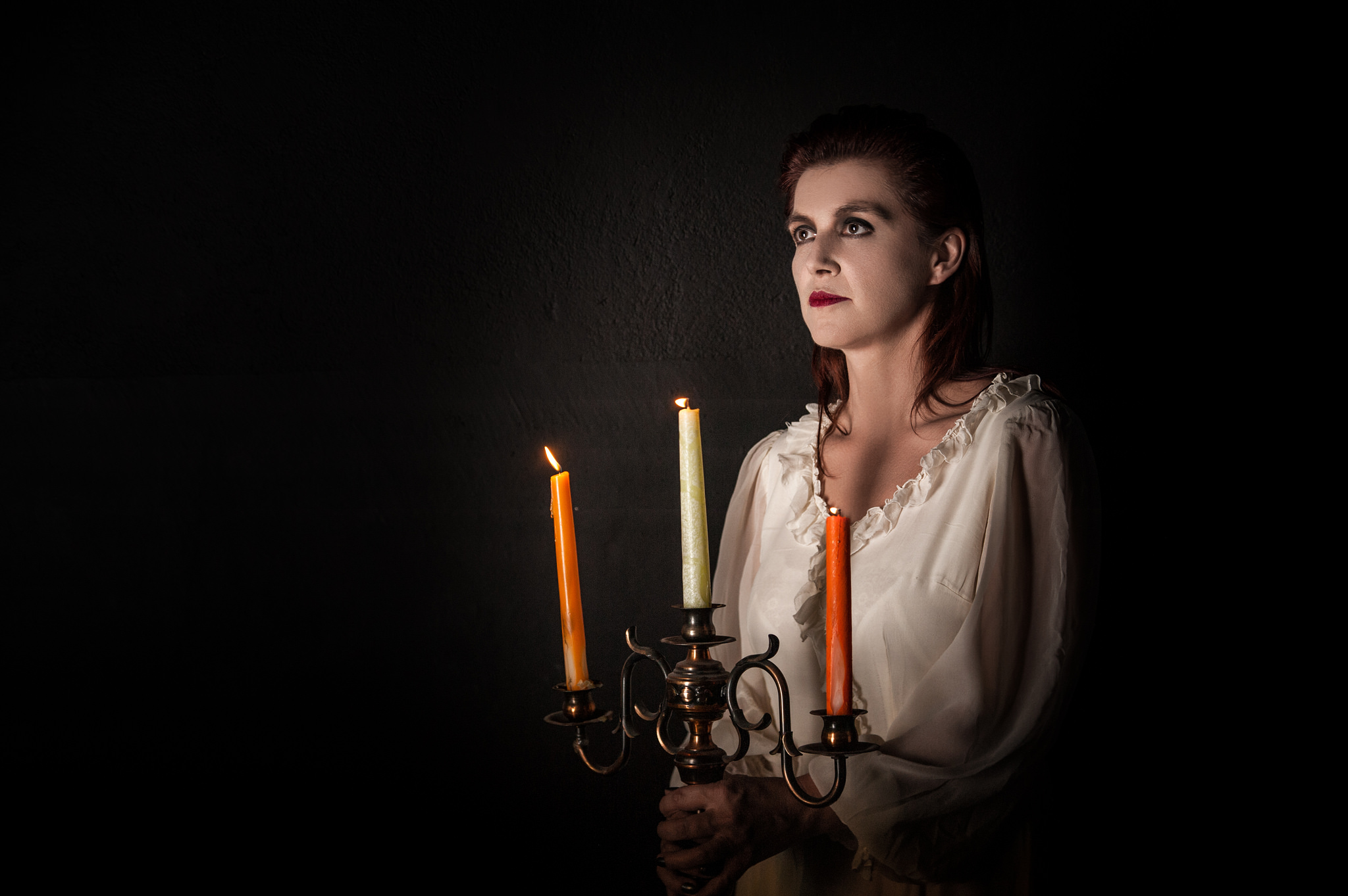 Agnieszka Makówka. Projekt "Metropolis" w obsadzie: Agnieszka Makówka, Igor Gwadera, Władysław Komendarek